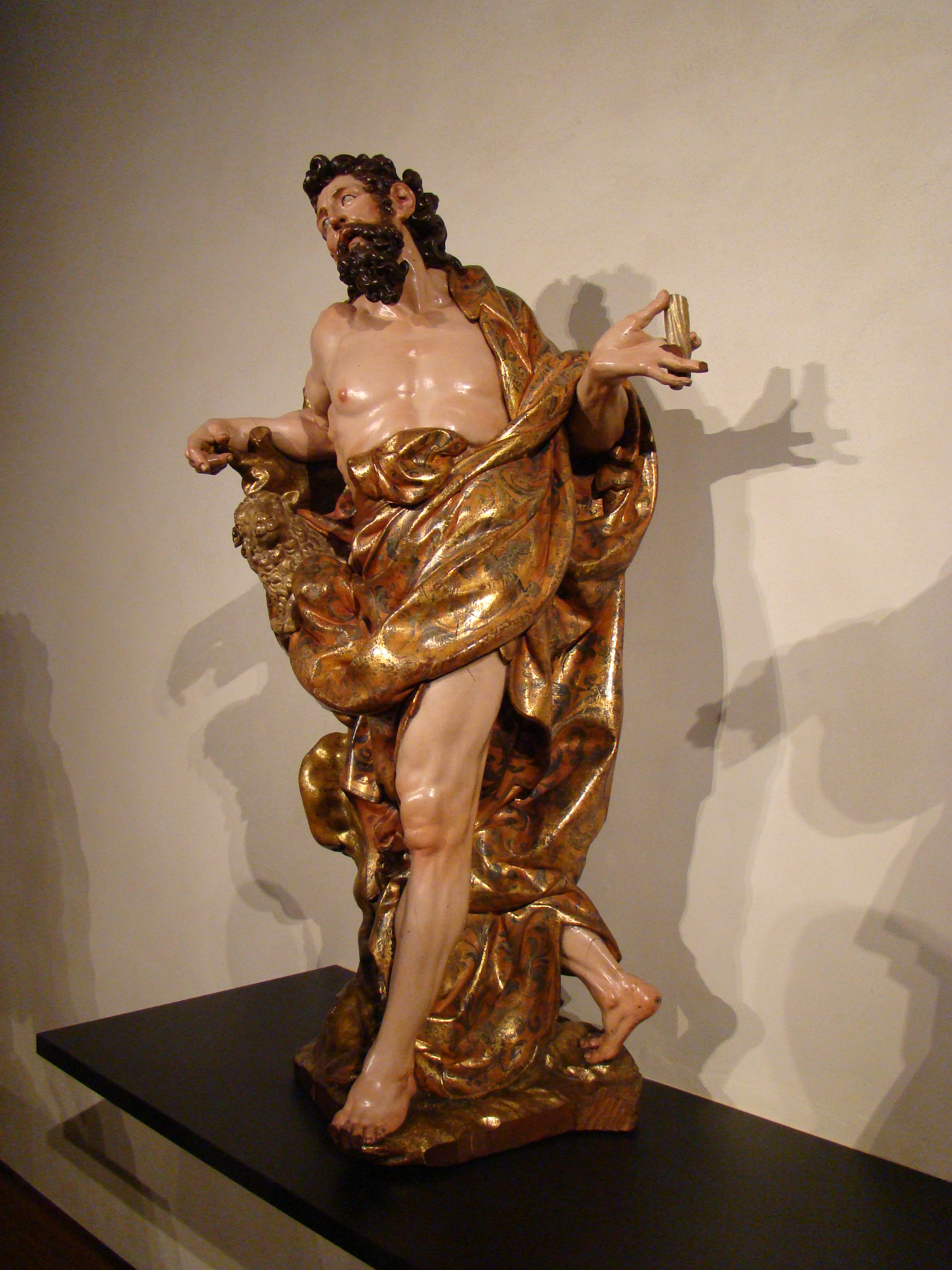 San Juan Bautista de Juan de Juni. Museo de Escultura de Valladolid. Perteneció al retablo de San Juan Bautista en una pequeña capìlla del desaparecido convento de San Benito de Valladolid.